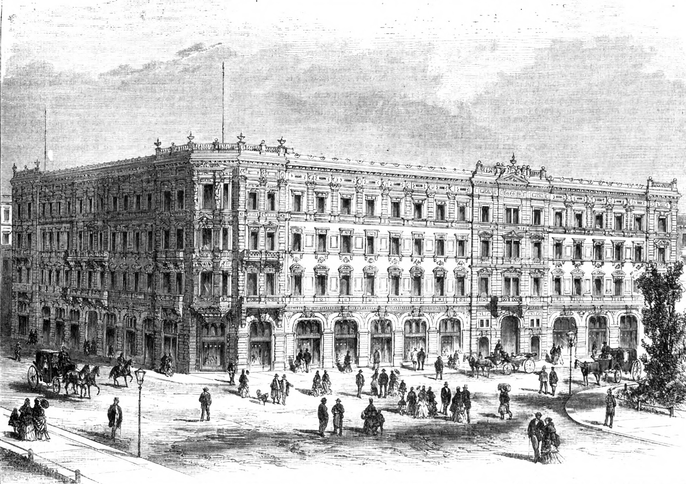 Allgemeine Deutsche Credit-Anstalt - Hauptverwaltung Das Gebäude im Karrée gegenüber dem späteren Hauptbahnhof begrenzt von Richard-Wagner-Straße, Brühl und Goethestraße diente der Allgemeinen Deutschen Credit-Anstalt als Hauptverwaltung und repräsentativer Geschäftssitz. Es wurde in den Jahren 1872-1874 von Architekt Carl Gustav Aeckerlein erbaut. Stich von Bruno Straußberger - Illustrirte Zeitung Bd 63 (1874), S. 309